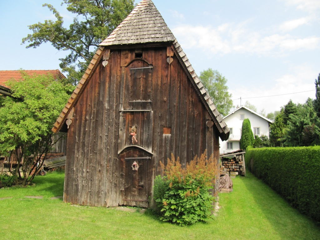 Der Troadkasten (Getreidespeicher) auf dem Gelände des Freilichtmuseum Aignerhaus.